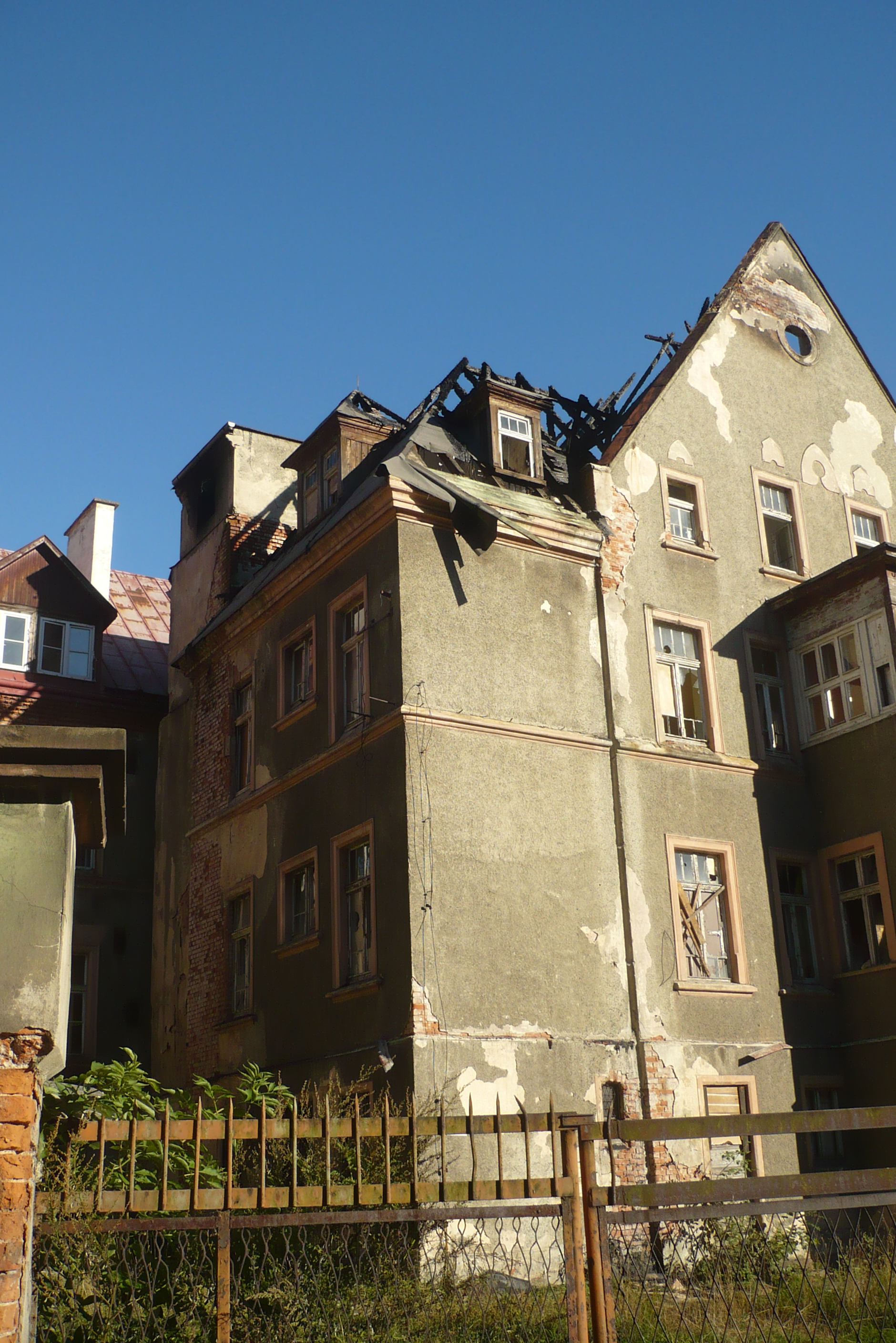 Szpital miejski w Nowej Rudzie